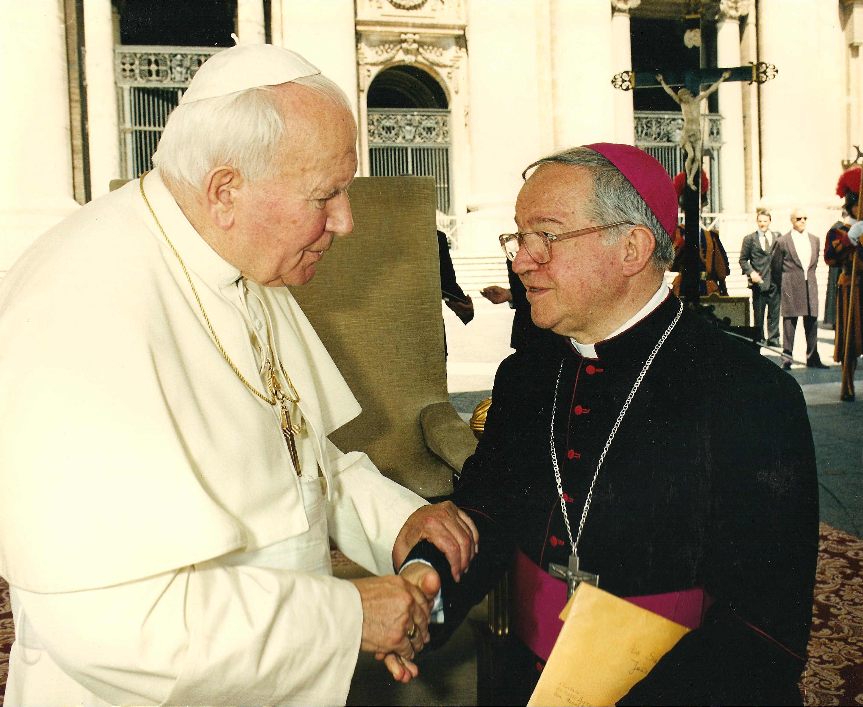 Encontro de Dom Manoel com São João Paulo II em Roma